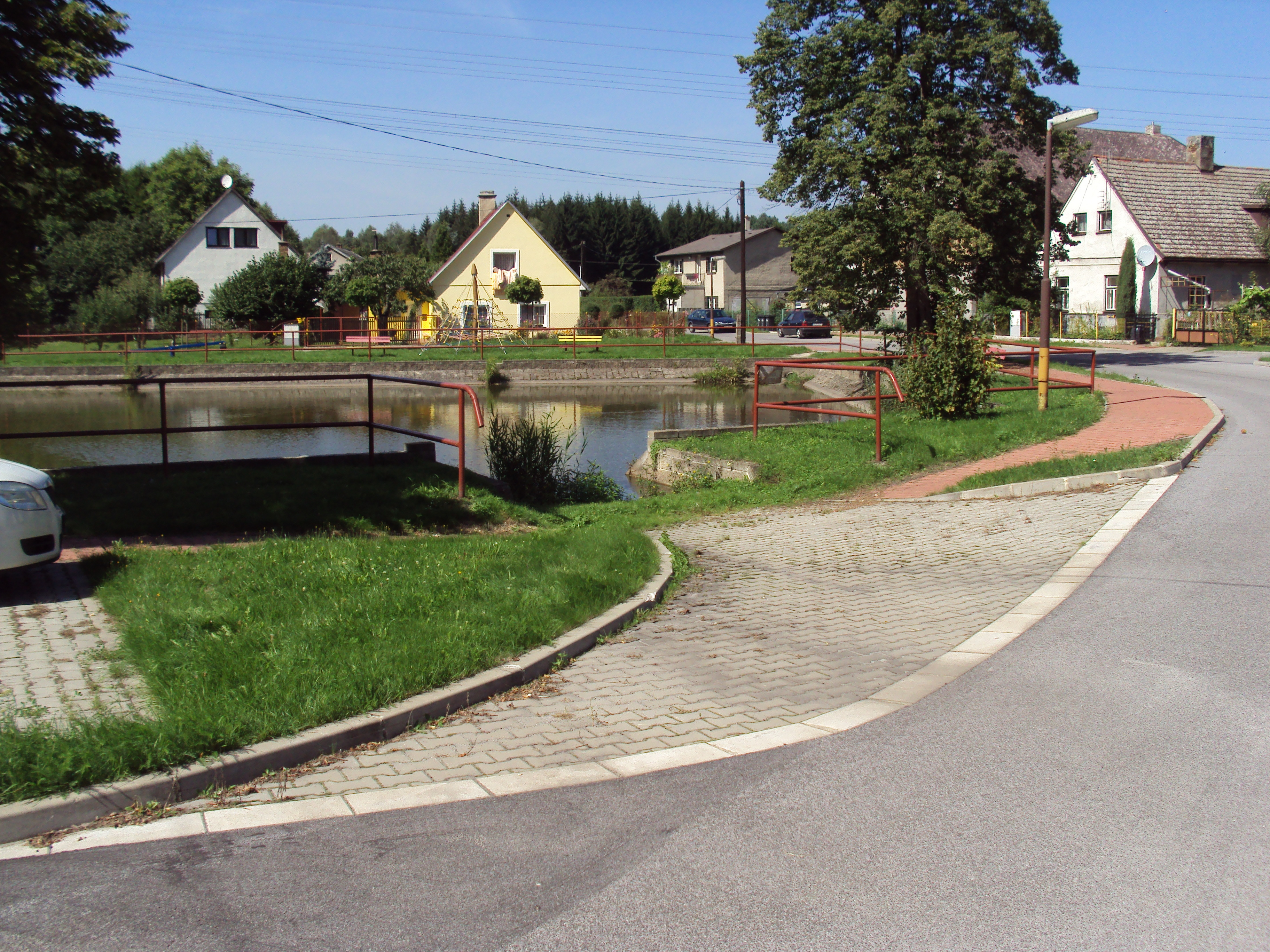 Požární nádrž v Sosnové u České Lípy